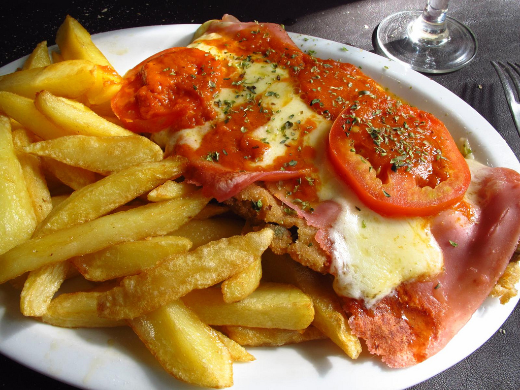 Milanesa napolitana con papas fritas, rodajas de tomate y orégano.